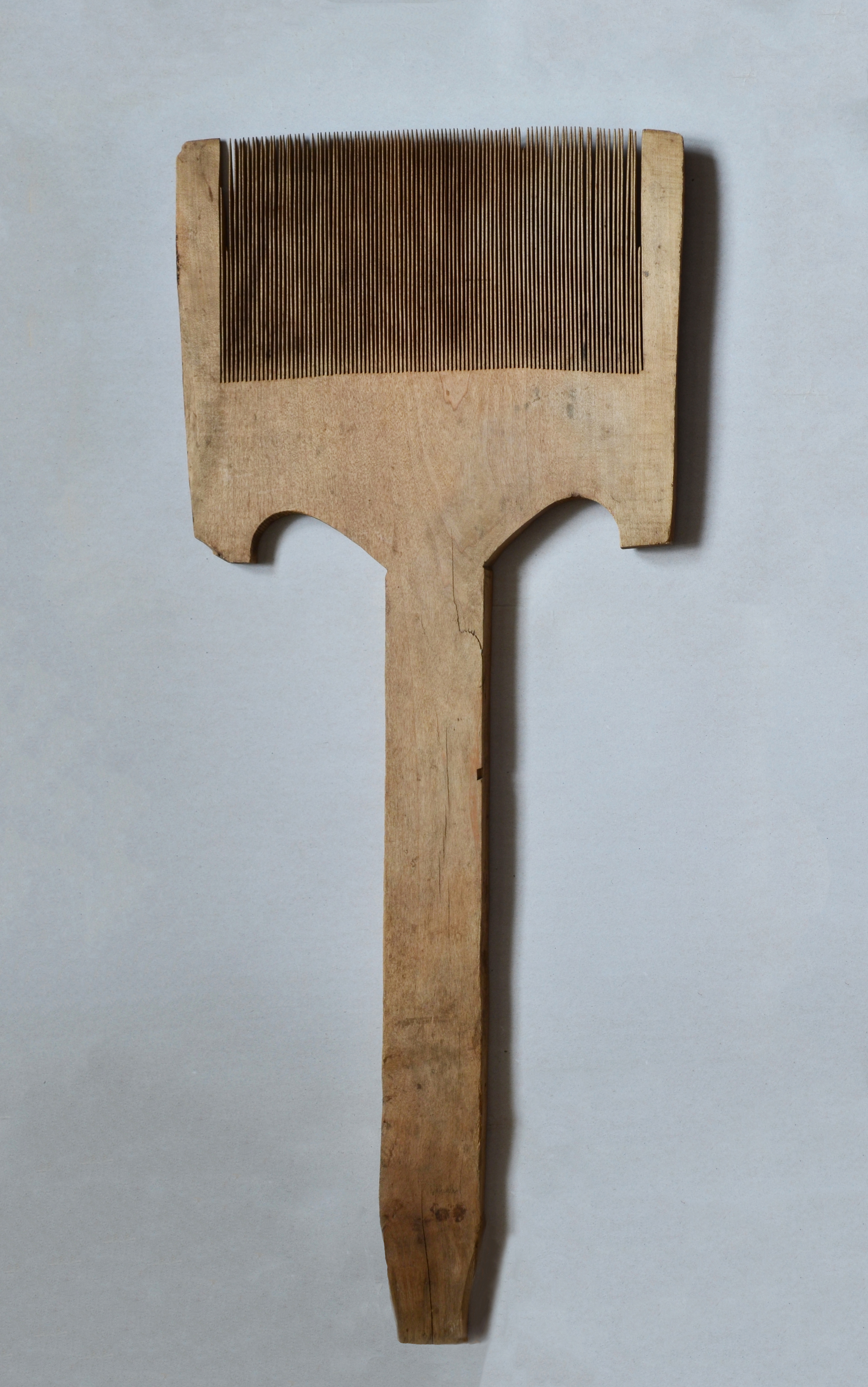 Гребень прядильный от ручной прялки.Рязанская губерния,19 век.